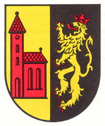 Wappen von Neunkirchen am Potzberg